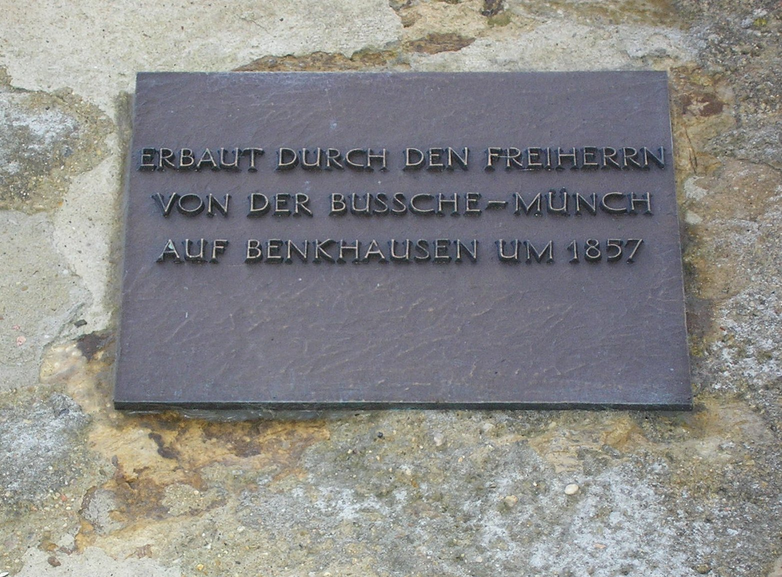 Gedenktafel am Wartturm Sonstiges: zur freien Verwendung